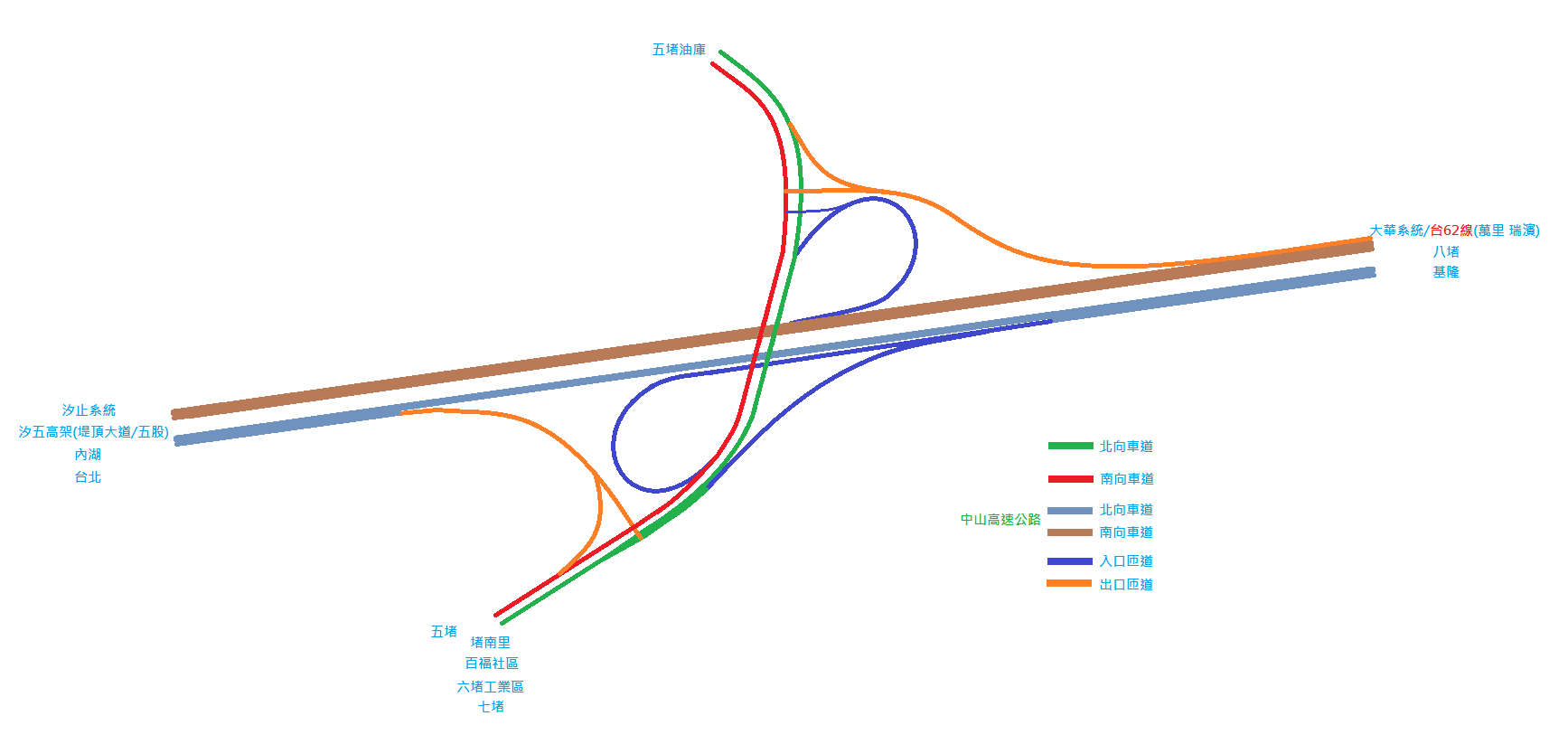 中文（台灣）: 國道一號中山高五堵交流道示意圖